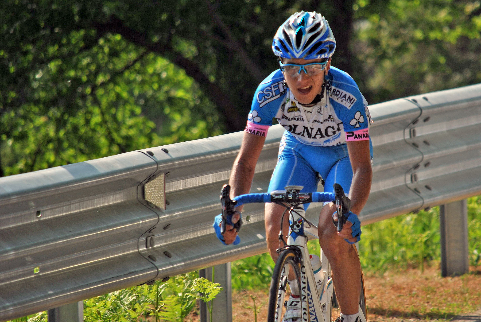 Pozzovivo